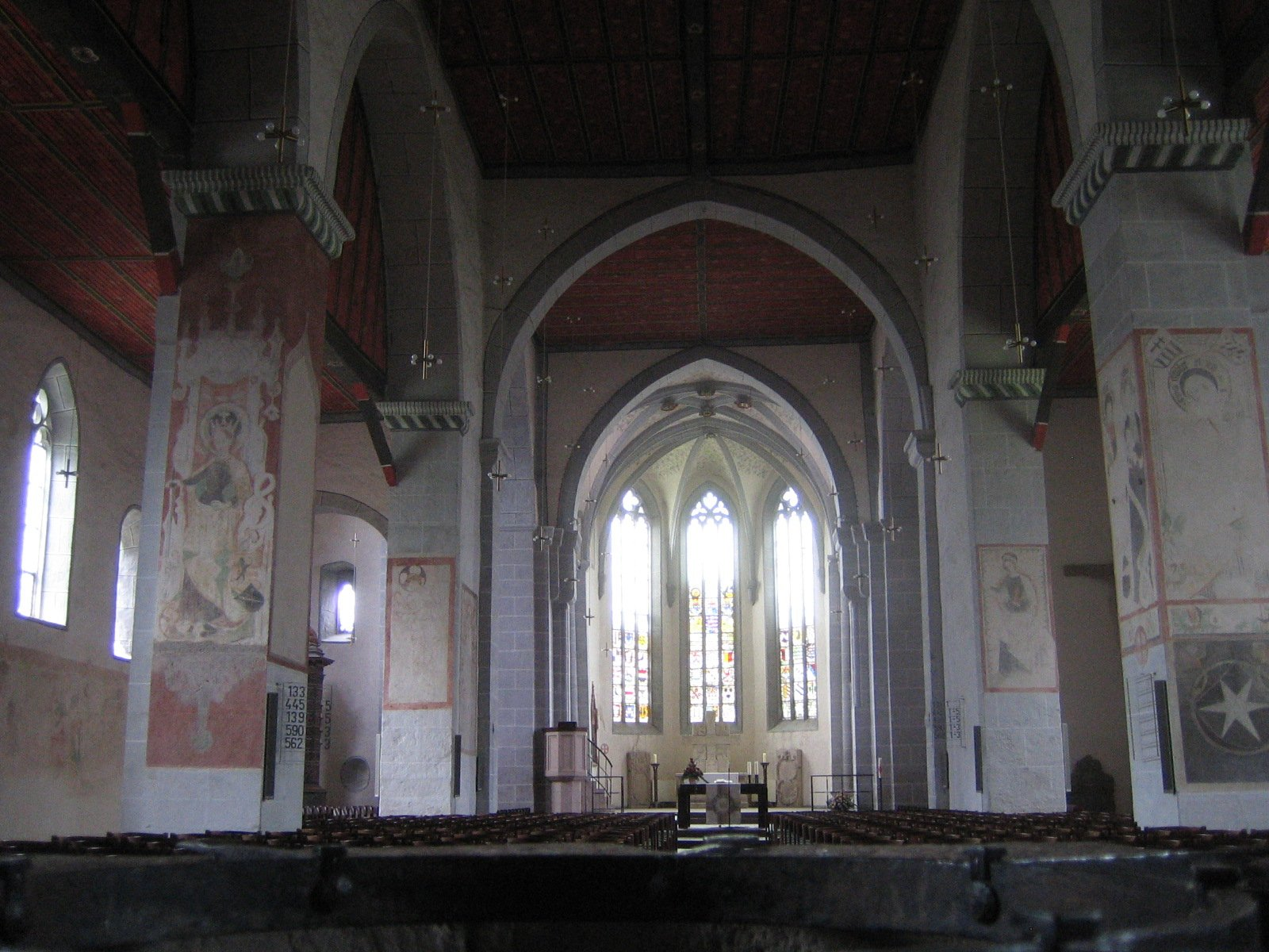 Stiftskirche Kaufungen, Blick nach Osten auf Altar und Kanzel